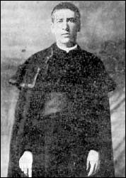 Toribio Romo González